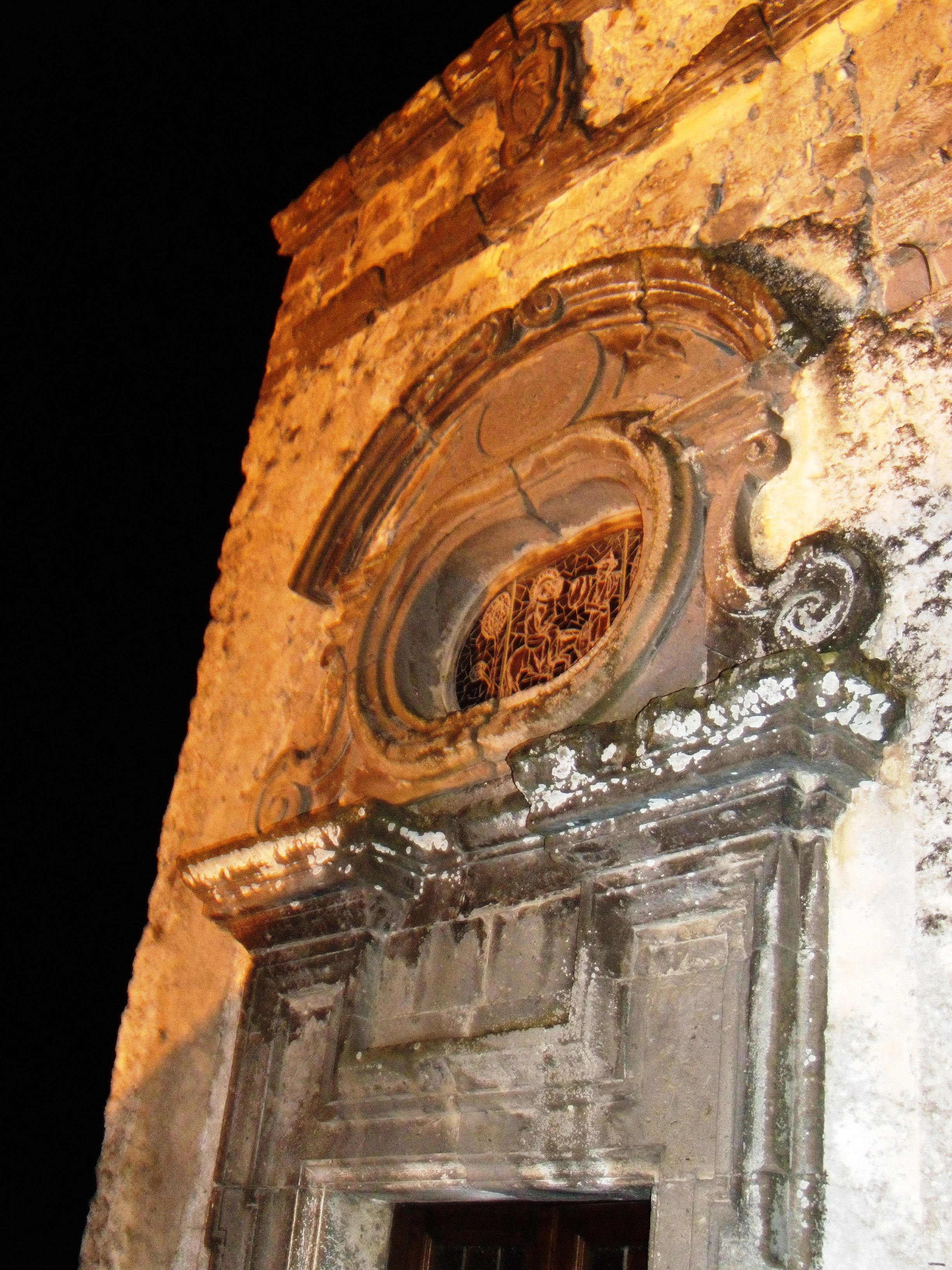 Particolare del portale di ingresso alla cappella palatina del Castello di Faicchio (Benevento). Secondo la tradizione popolare nella cappella si trovava un quadro raffigurante Santa Barbara che veniva fatto baciare ai condannati dopo le funzioni religiose. Costoro, avvicinandosi al quadro per baciarlo, ponevano a loro insaputa i piedi su di una botola che, aprendosi all'improvviso, li faceva cadere nelle segrete del castello. La botola che secondo la tradizione veniva usata per questo "trabocchetto" è ancora oggi sita nel pavimento della cappella.